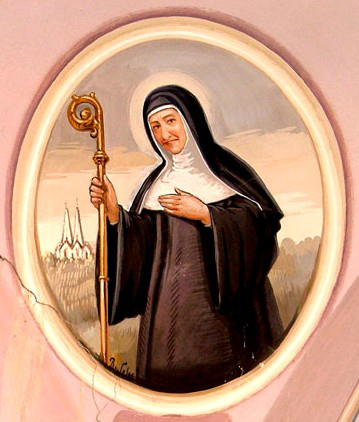 Fresco que representa a Santa Matilde de Hackeborn. LLamada también Matilde de Helfta.